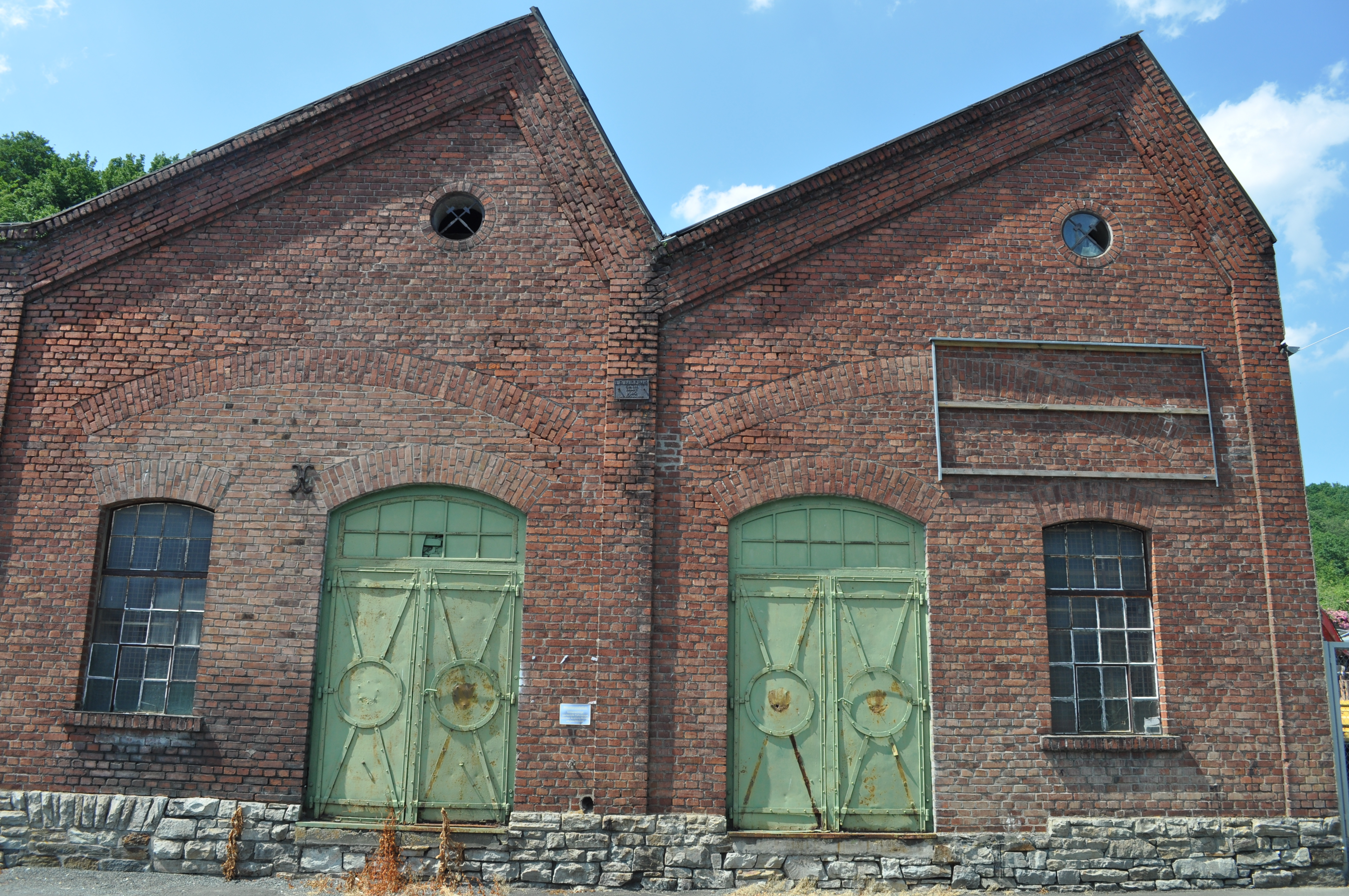 Gebäude des ehemaligen Buderuswerkes in Audenschmiede, erbaut 1910